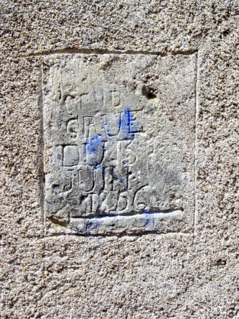 Marque commémorative de la crue de la Loire de 1856 sur une maison de Limeray - Indre et Loire - France